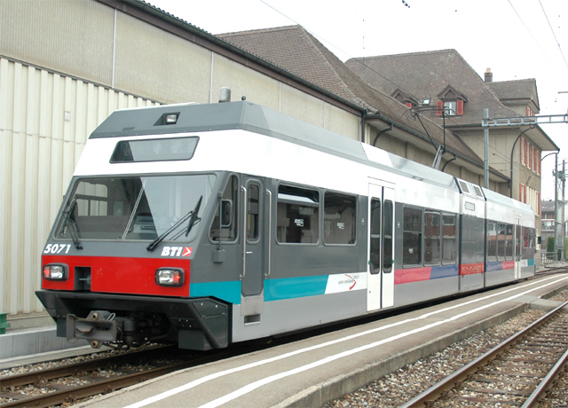 Biel-Täuffelen-Ins-Bahn (BTI) treinstel Be 2/6 nr 507 op 25 februari 2006 te Täuffelen